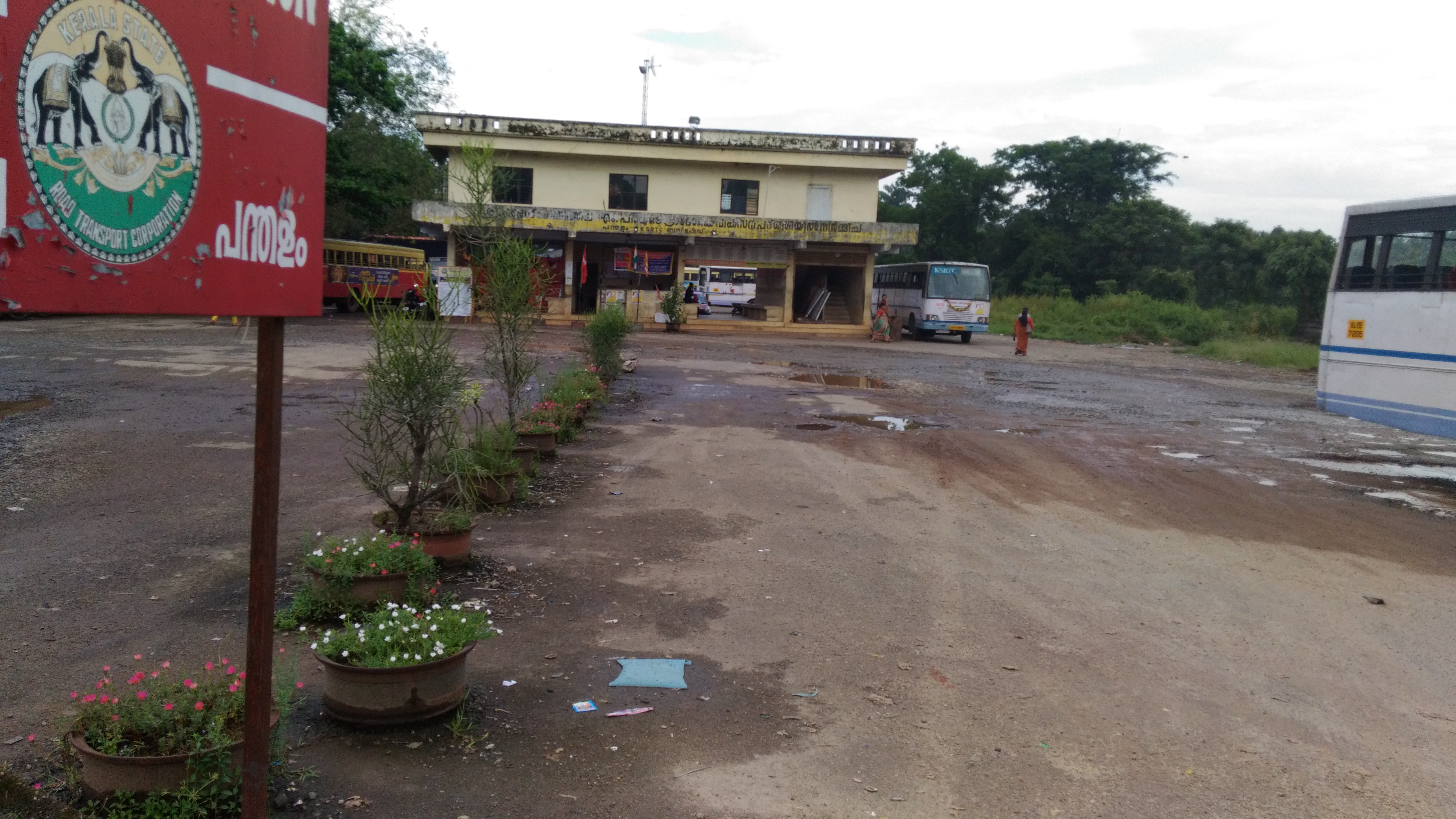 Pandalam KSRTC Bus Station